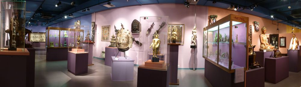 Népal, Musée Asiatica